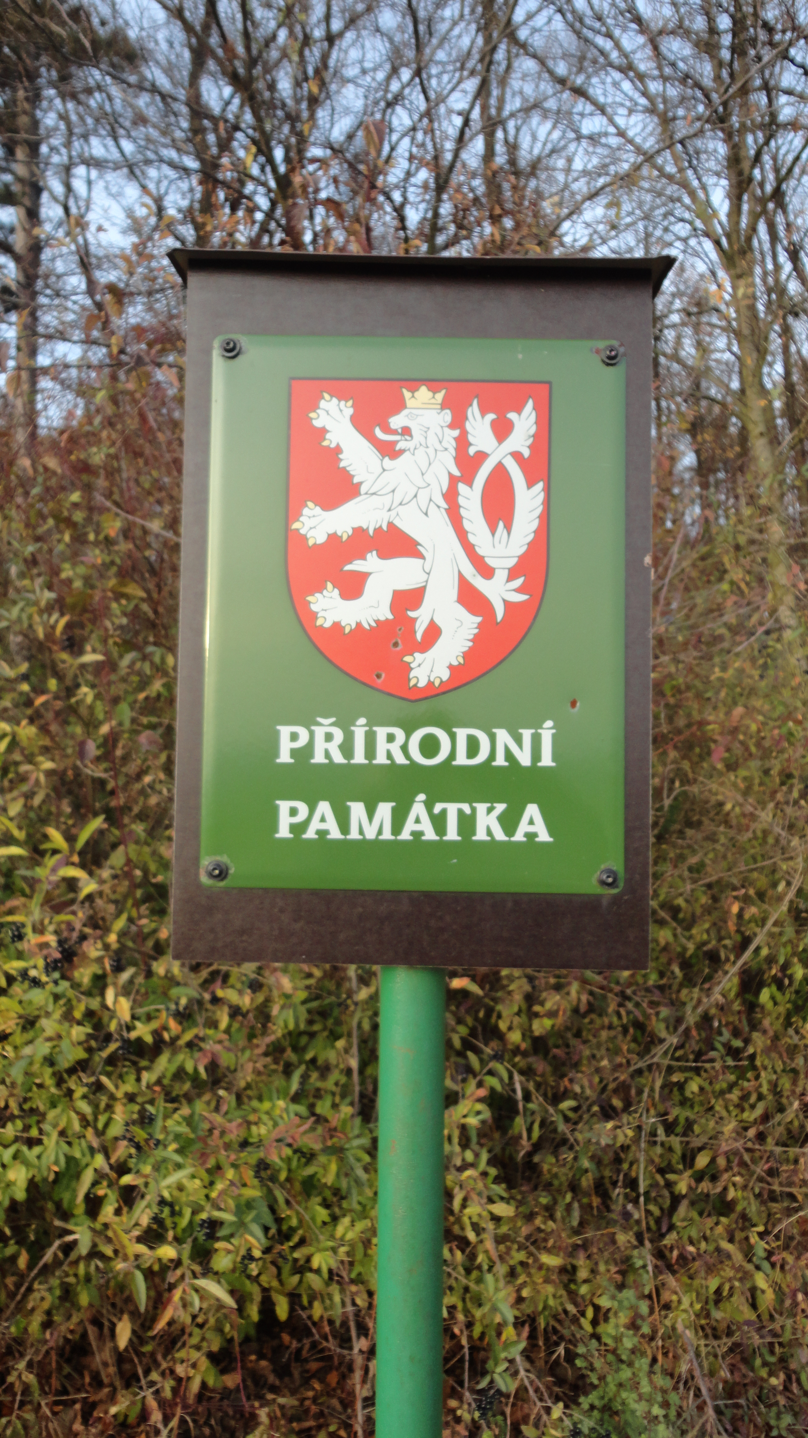 PP Oškobrh